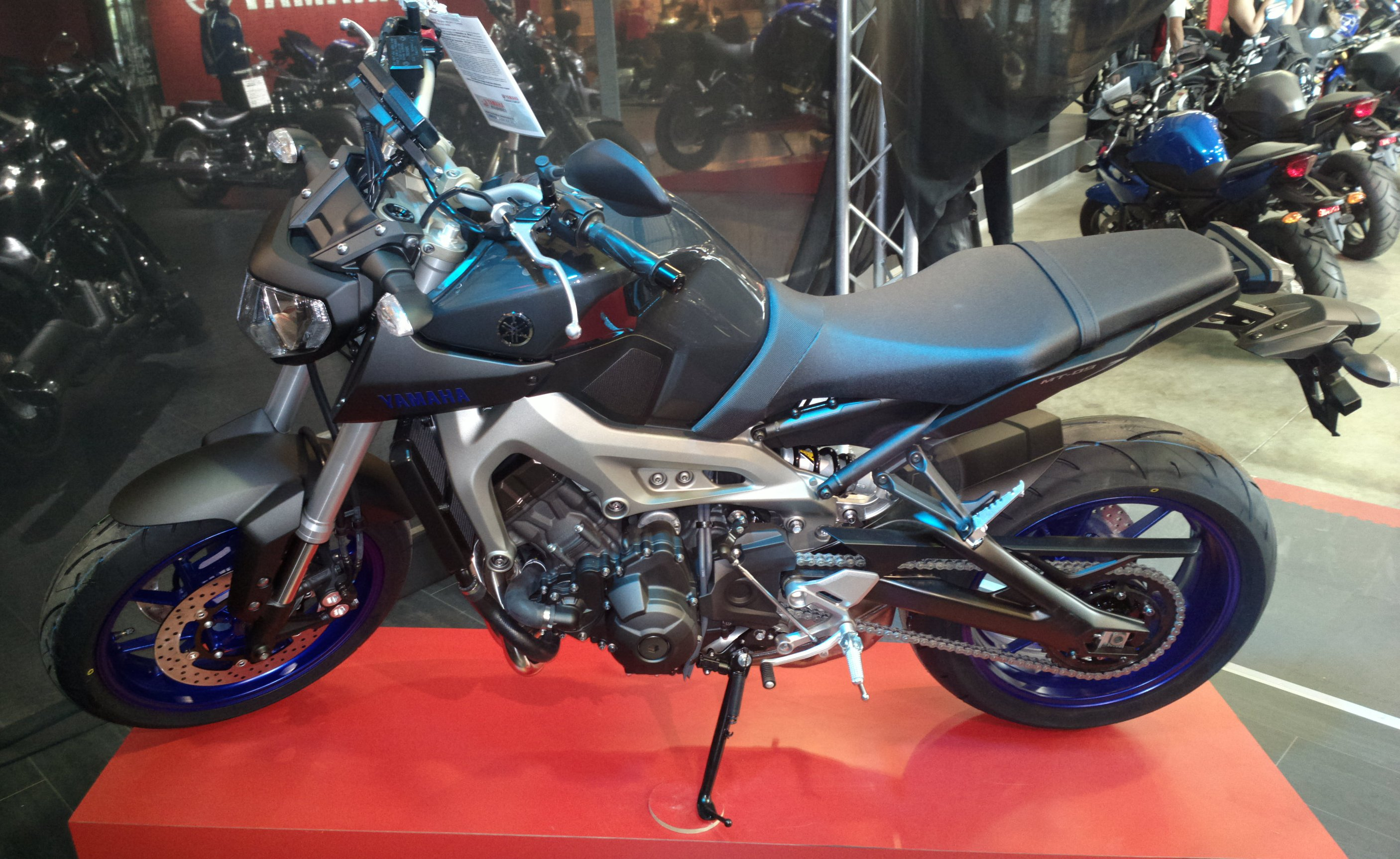 Yamaha MT-09 couleur "Race Blu"